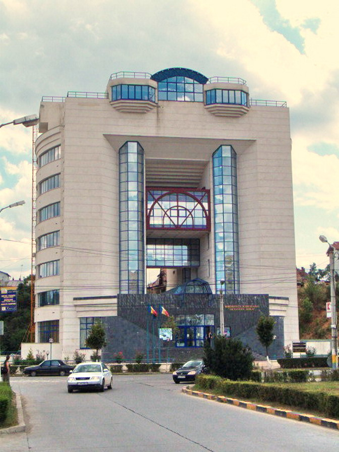 Cluj-Napoca, Biblioteca Judeţeană "Octavian Goga", Mărăşti (Calea Dorobanţilor nr. 104)